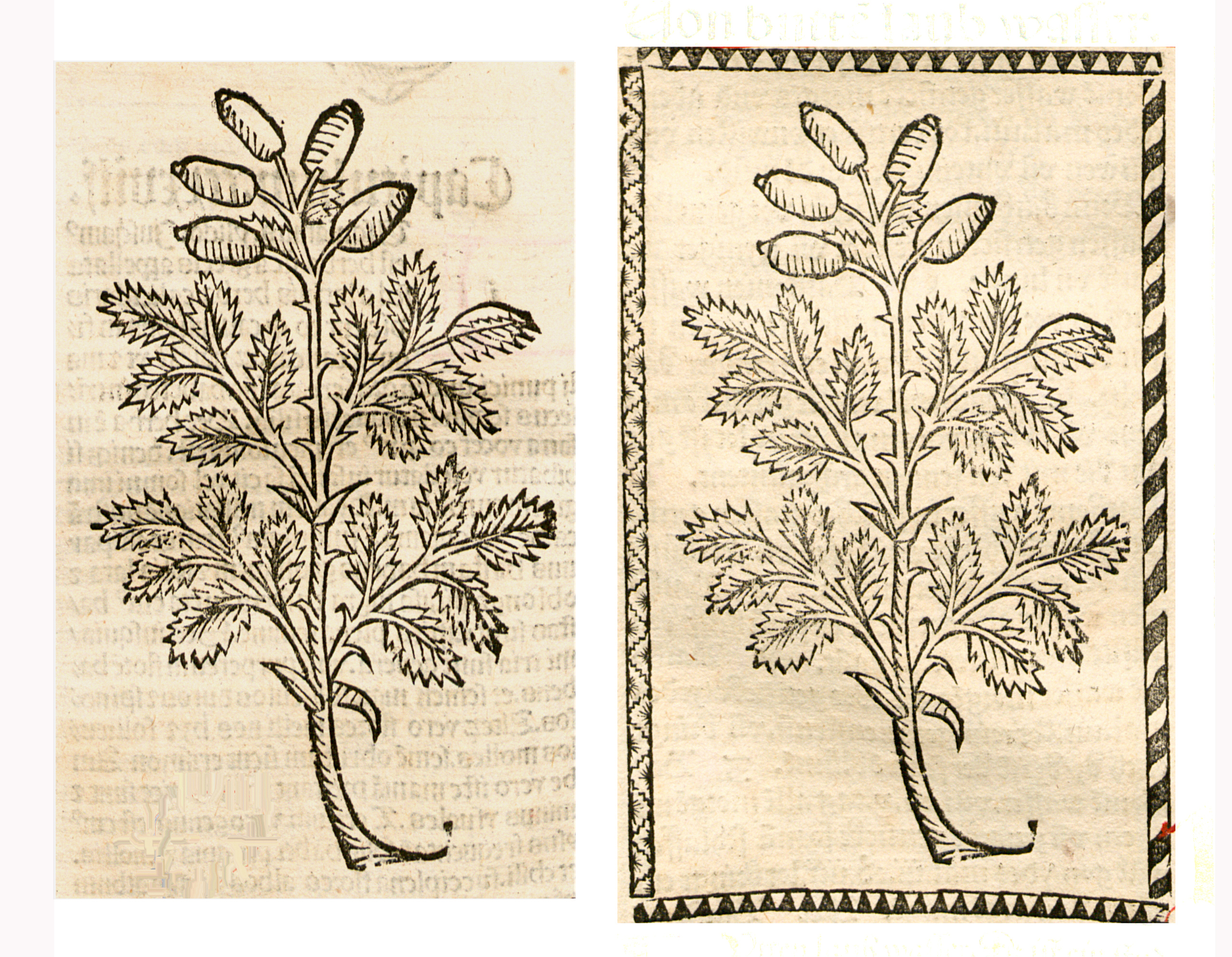 Abbildung von: Hagebutten